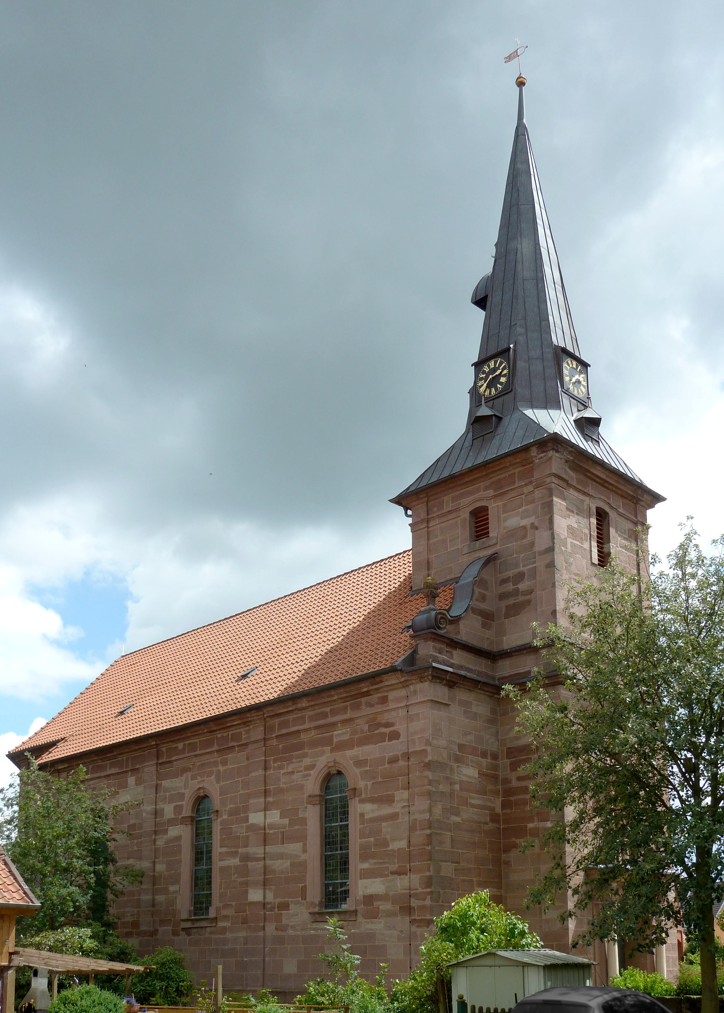 Katholische Kirche St. Matthäus in Bodensee, Untereichsfeld. Erbaut 1779